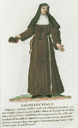 Collection de costumes de tous les ordres monastiques, supprimés à differentes époques, dans la ci-devant Belgique, Bruxelles, Philippe Joseph Maillart et sœur, 1811